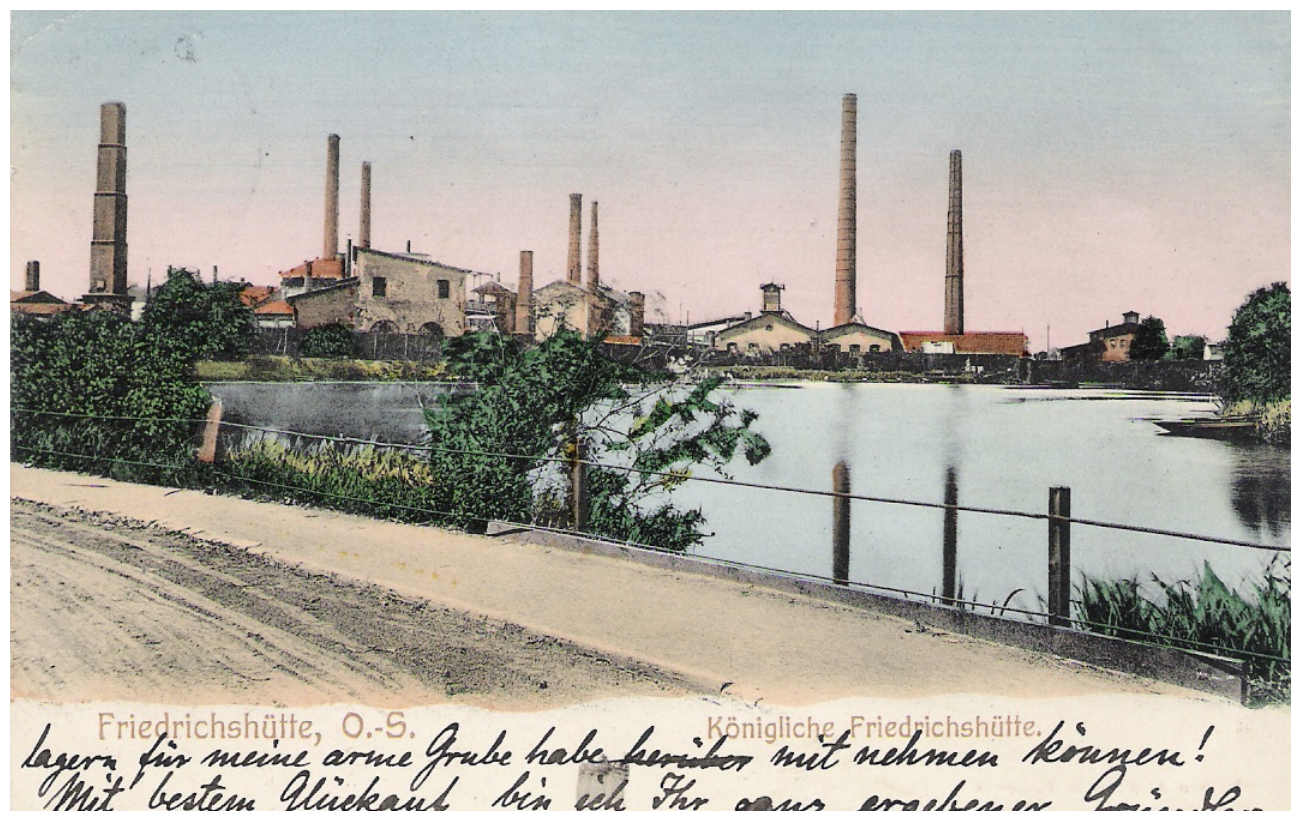 Królewska Huta Fryderyk w Strzybnicy (obecnie dzielnica Tarnowskich Gór). Pocztówka z 1904-1906